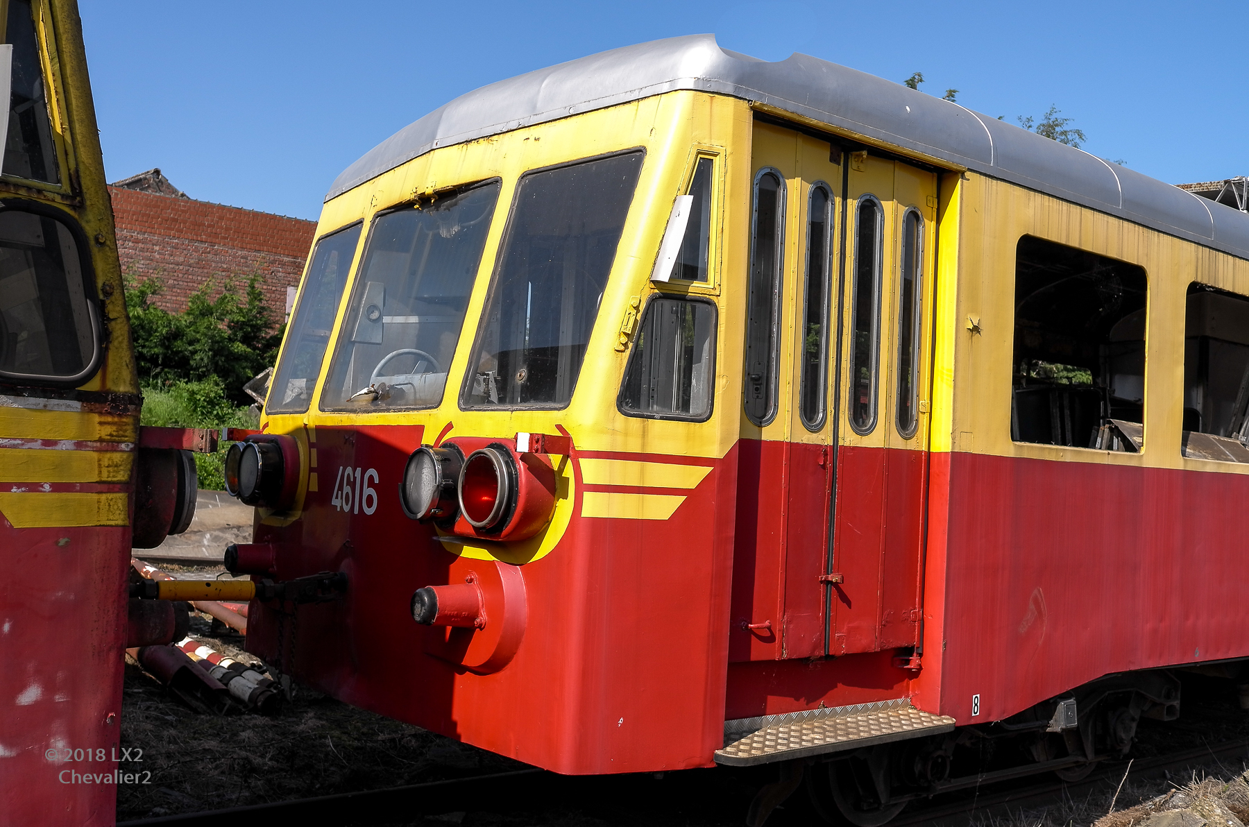 Autorail SNCB de type 554